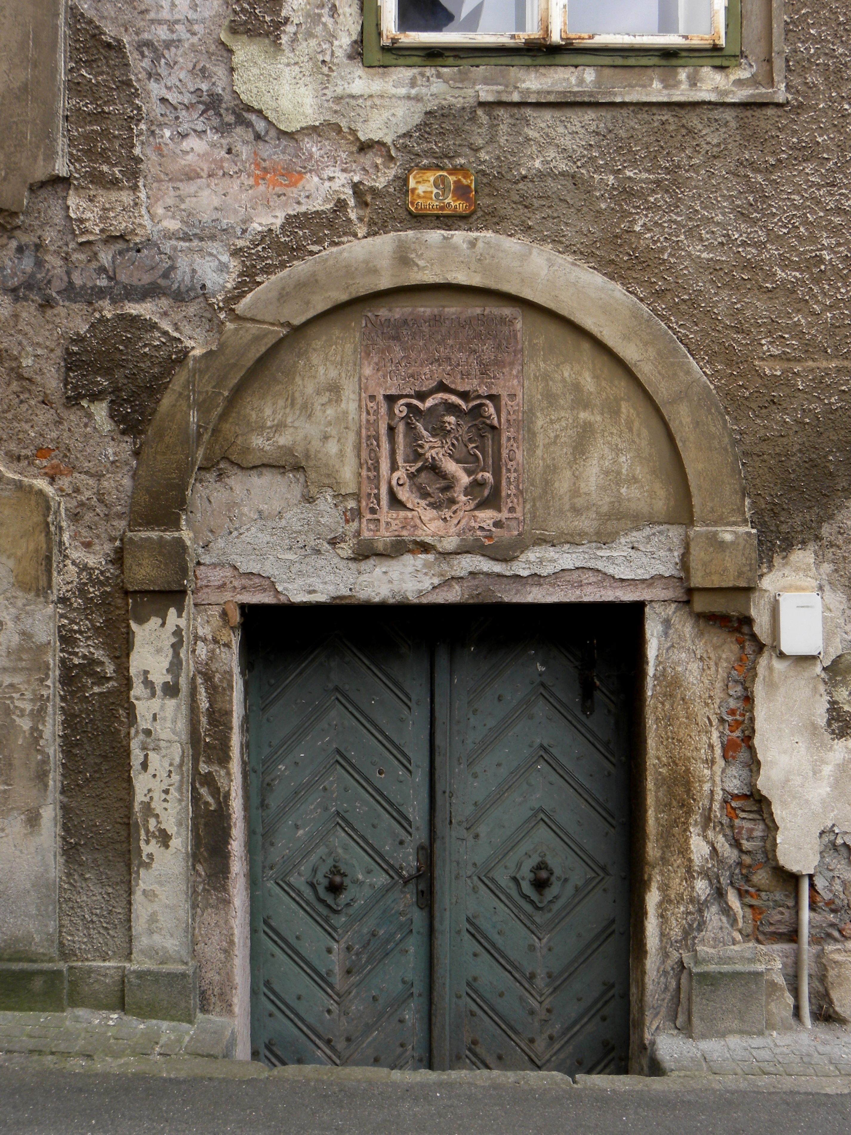 Schwarzer Hof